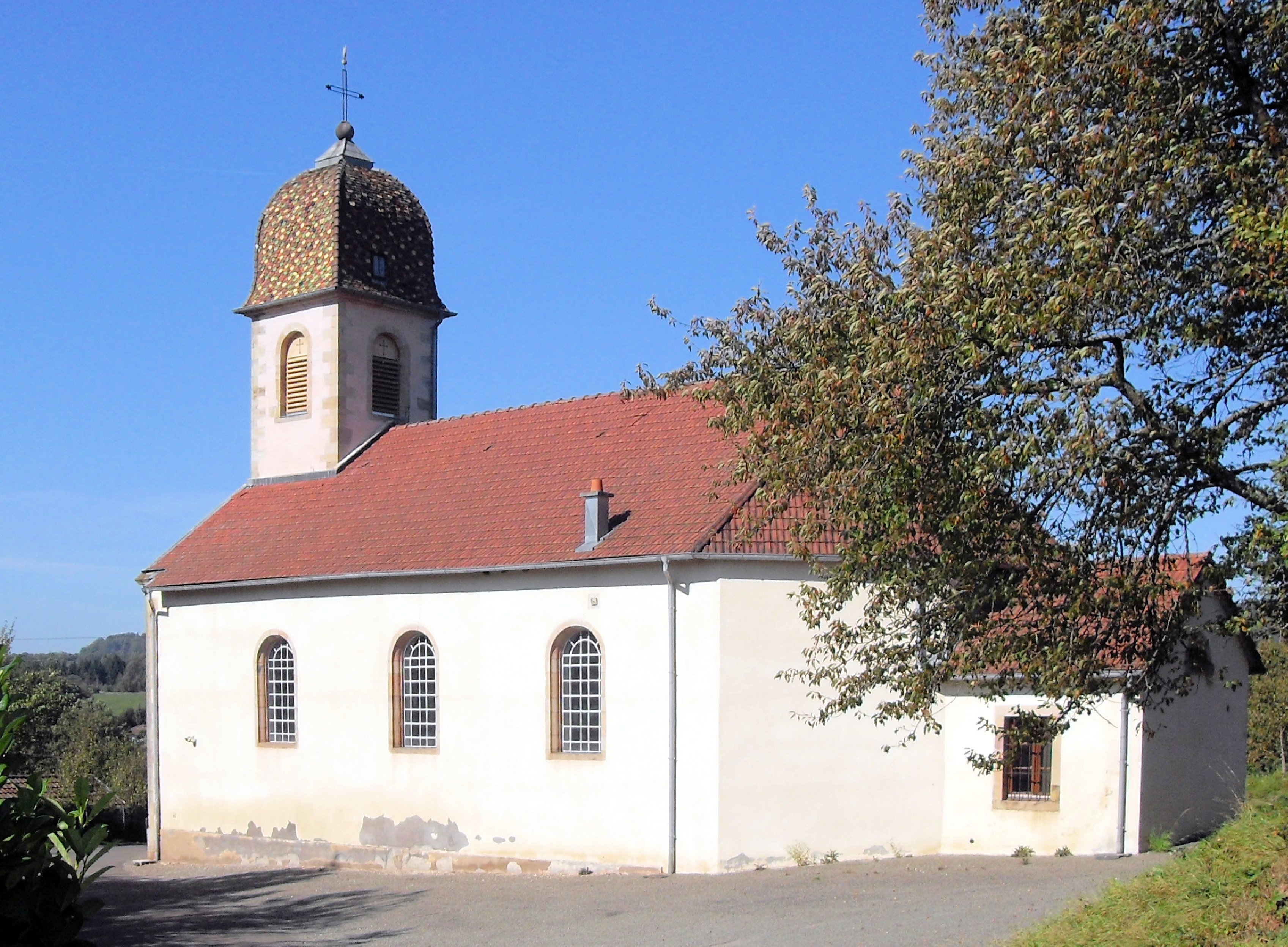 L'église_de_l'Assomption àChenebier